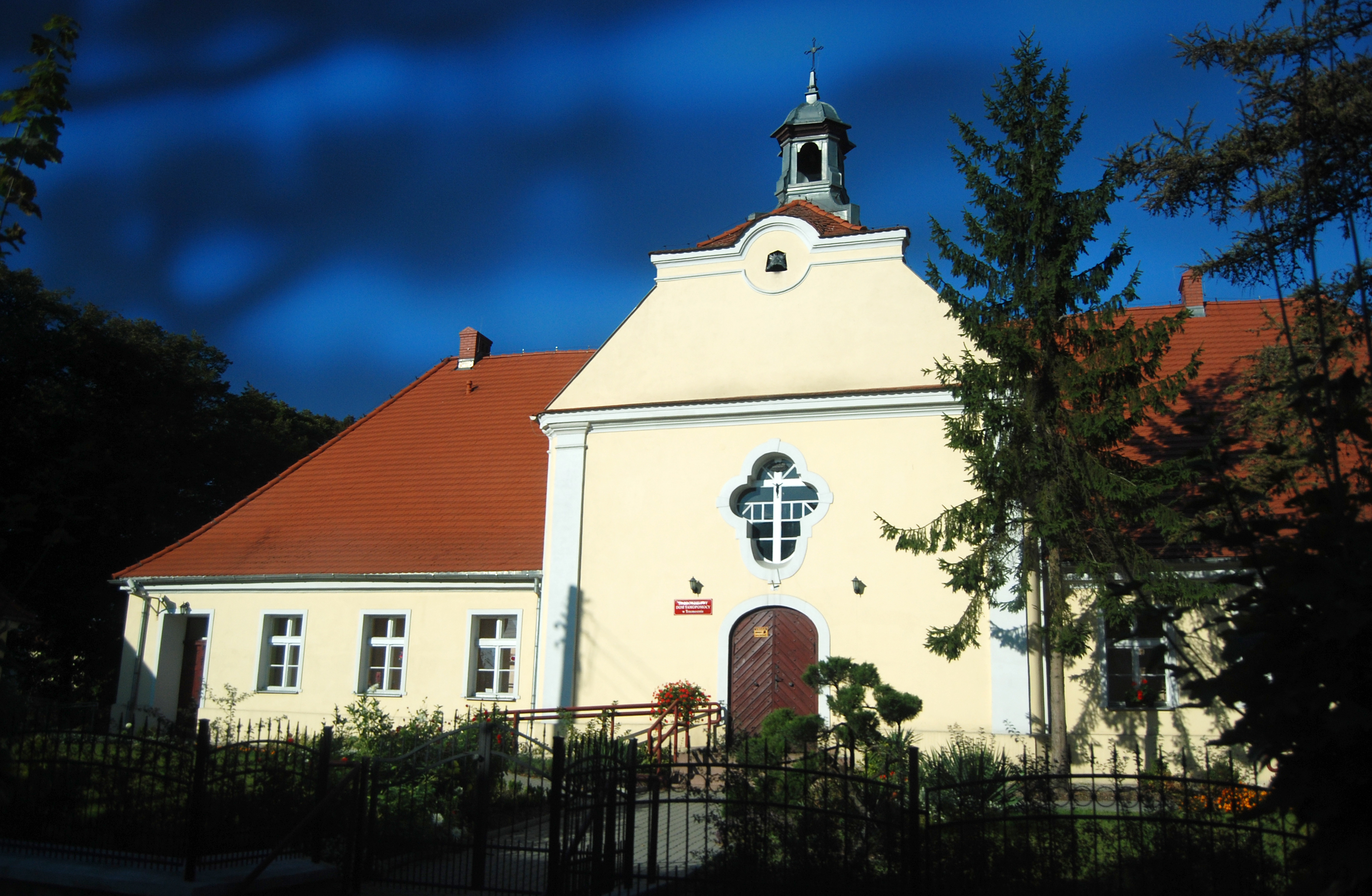 Trzemeszno, ul. Mickiewicza 28 - zespół dawnego szpitala św. Łazarza, obecnie "Środowiskowy Dom Samopomocy" (zabytek nr 445).